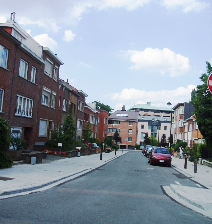 avenue Gaston De Gryse Auderghem Belgium